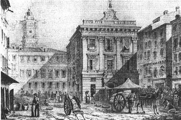 L'Hôtel de Ville ou palais communal de la place Saint-François, lithographie de Piccordi (signature en bas à droite) en 1840, aquarellée dans l'ouvrage de J.Saqui.